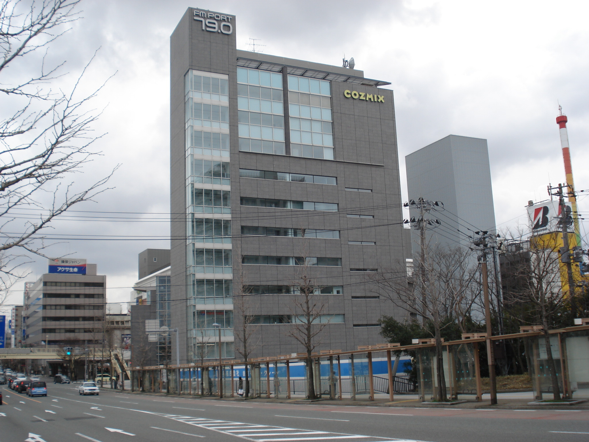 新潟県民エフエム(FM PORT)本社 COZMIXビル 新潟県新潟市中央区万代2丁目